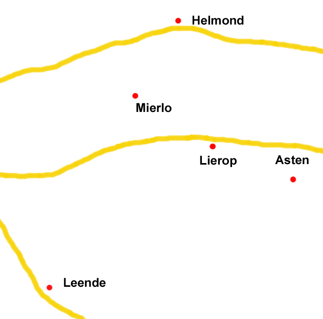 kaart van de omgeving van Asten, de vroegere Peelstreek